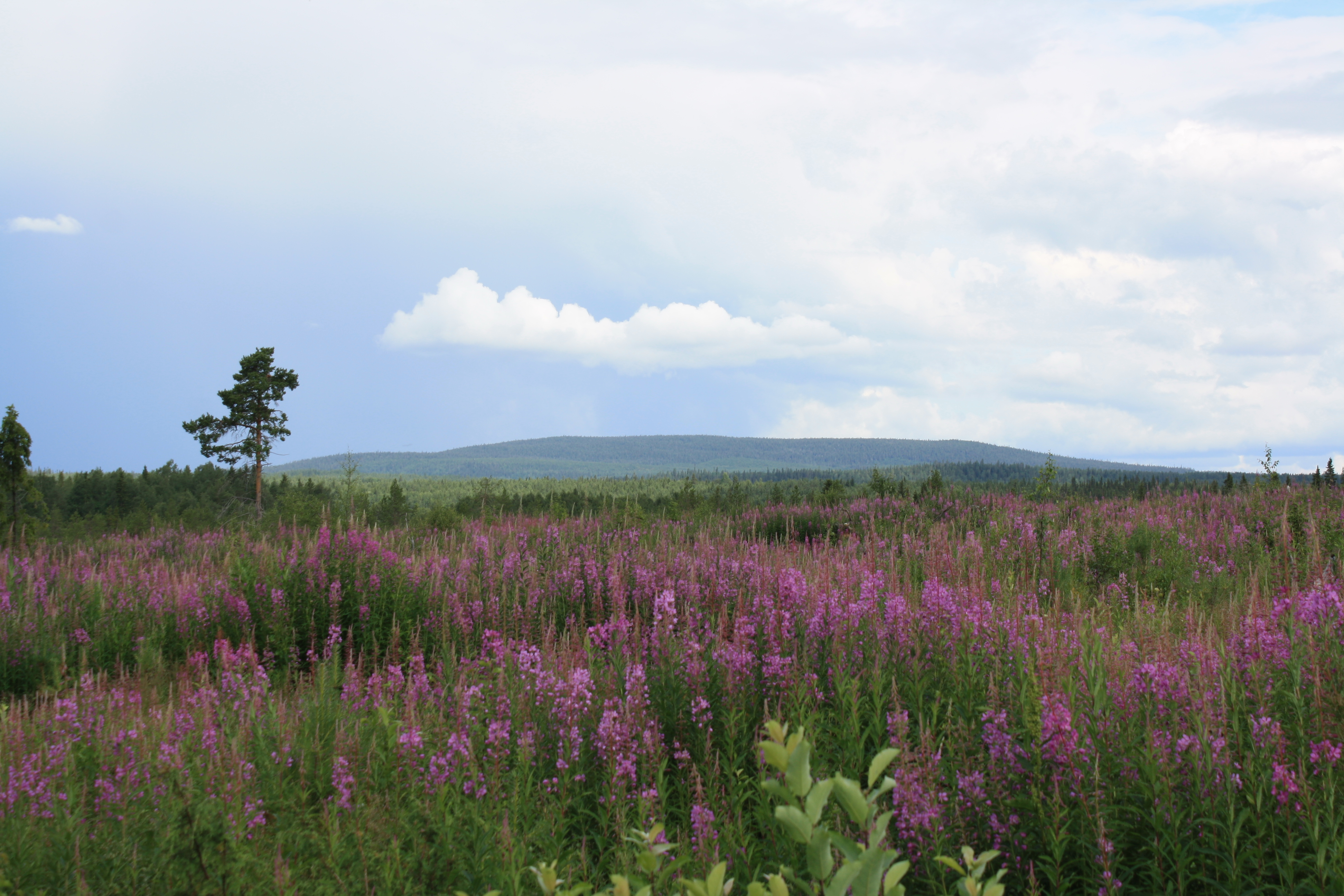 Kuntivaara etelästä, läheltä Kiviperää kuvattuna.